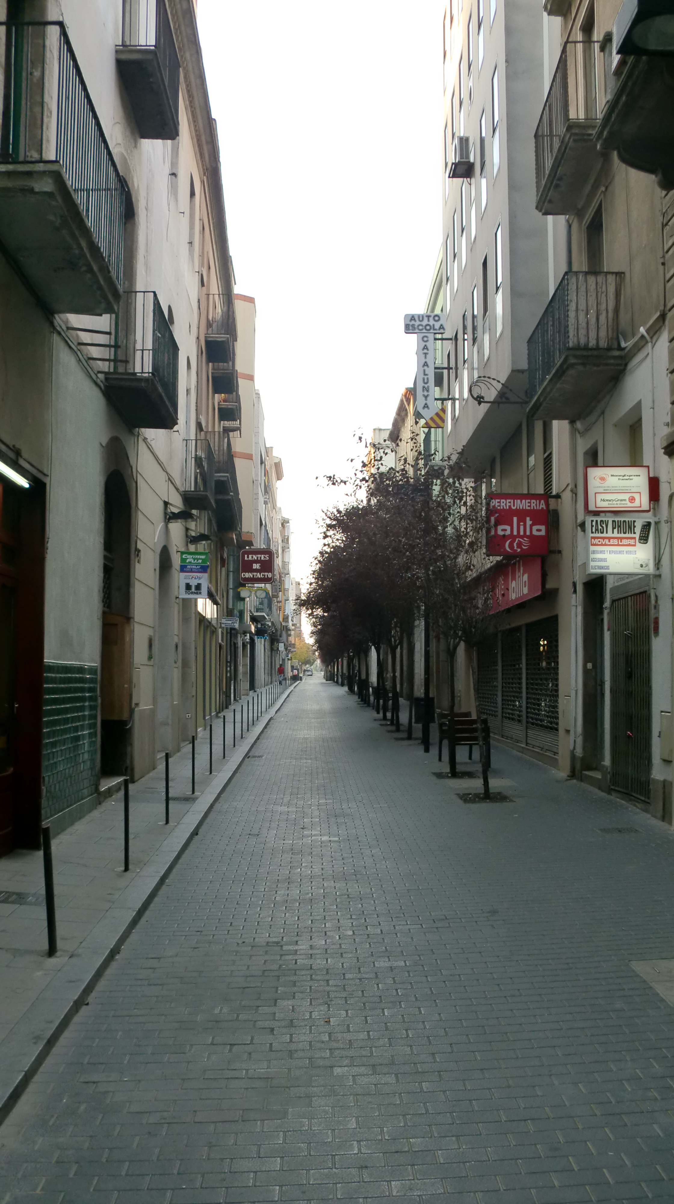 Conjunt carrer Sant Pau (Figueres)